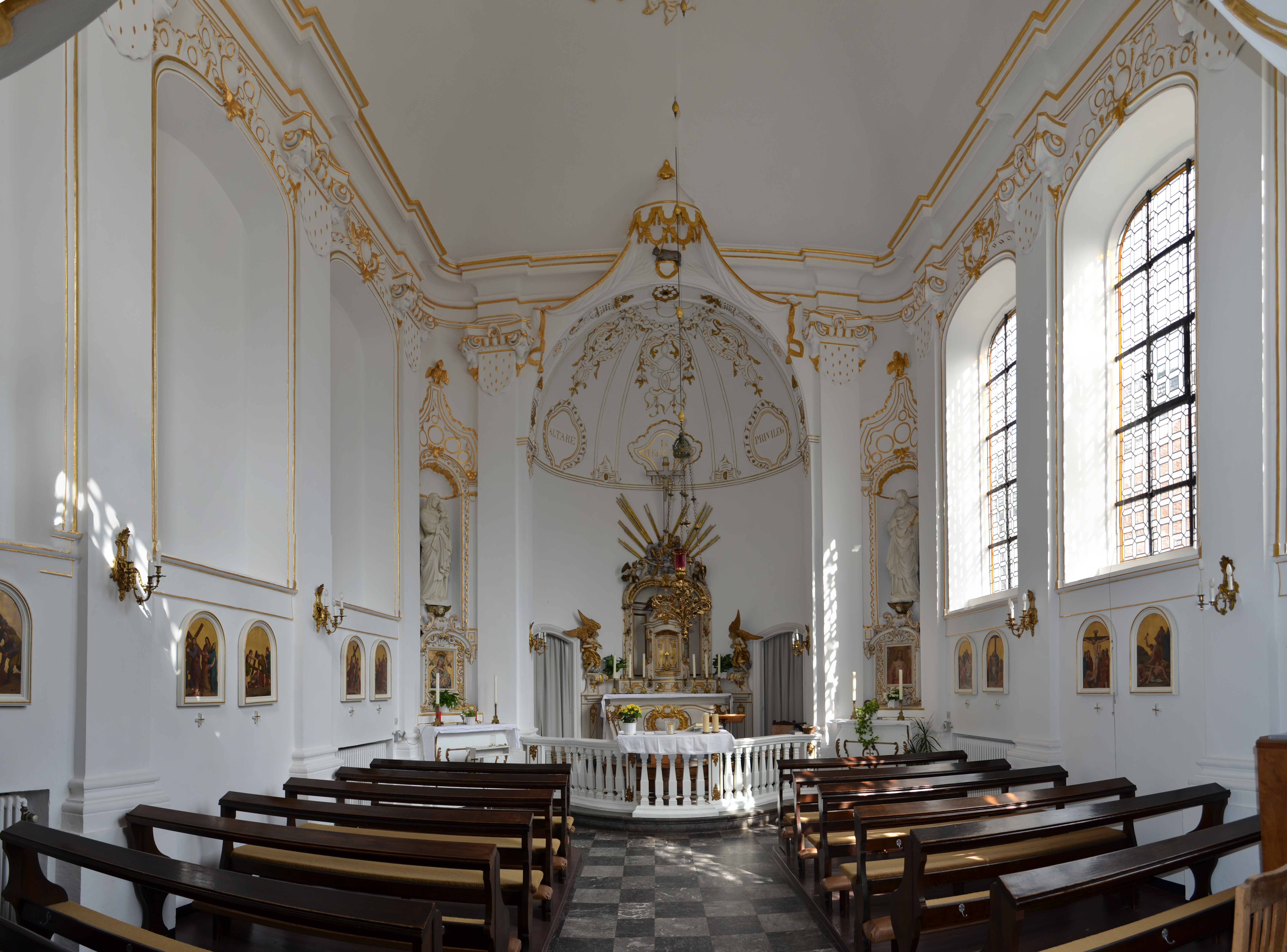 Sankt Johannes-Baptist Enthauptungskapelle in Nispert, Innenansicht